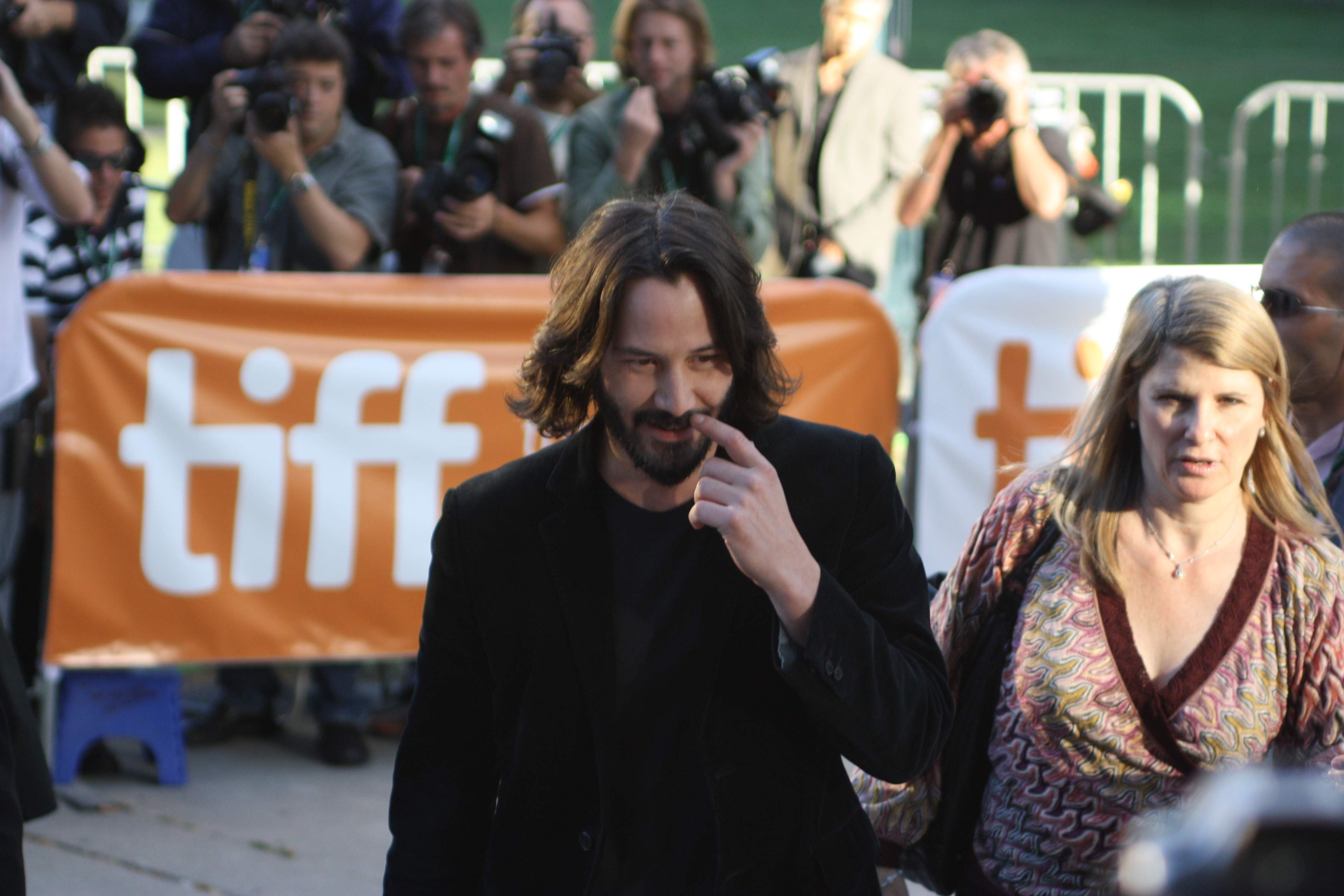 Keanu Reeves - TIFF 09